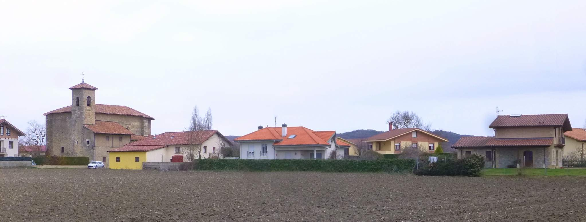 Yurre (Vitoria, Álava)